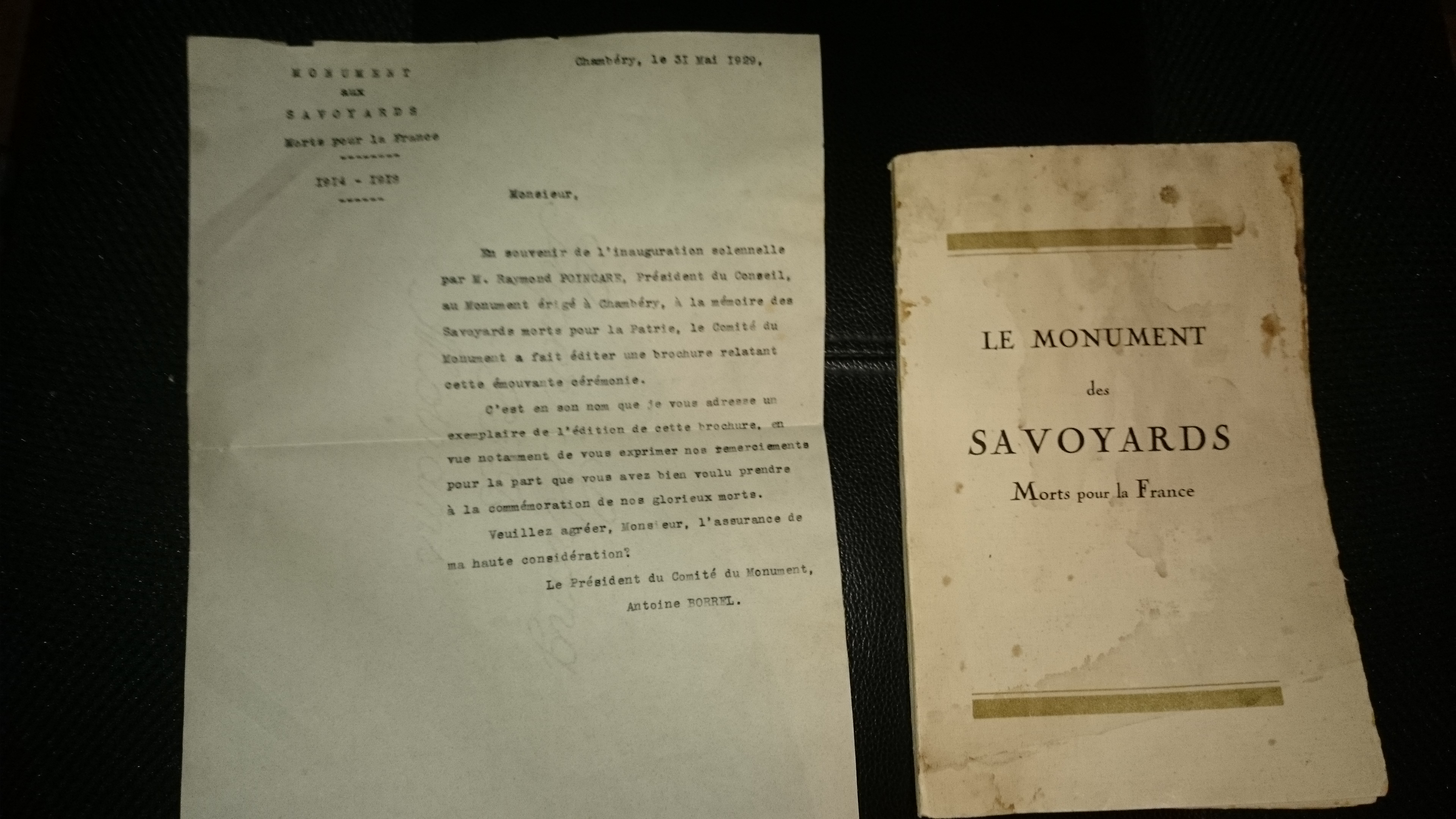 Un exemplaire de la brochure de 1929 du "monument des savoyards morts pour la France" accompagné d'une lettre d'Antoine Borrel parlant de l'édition de cette brochure.